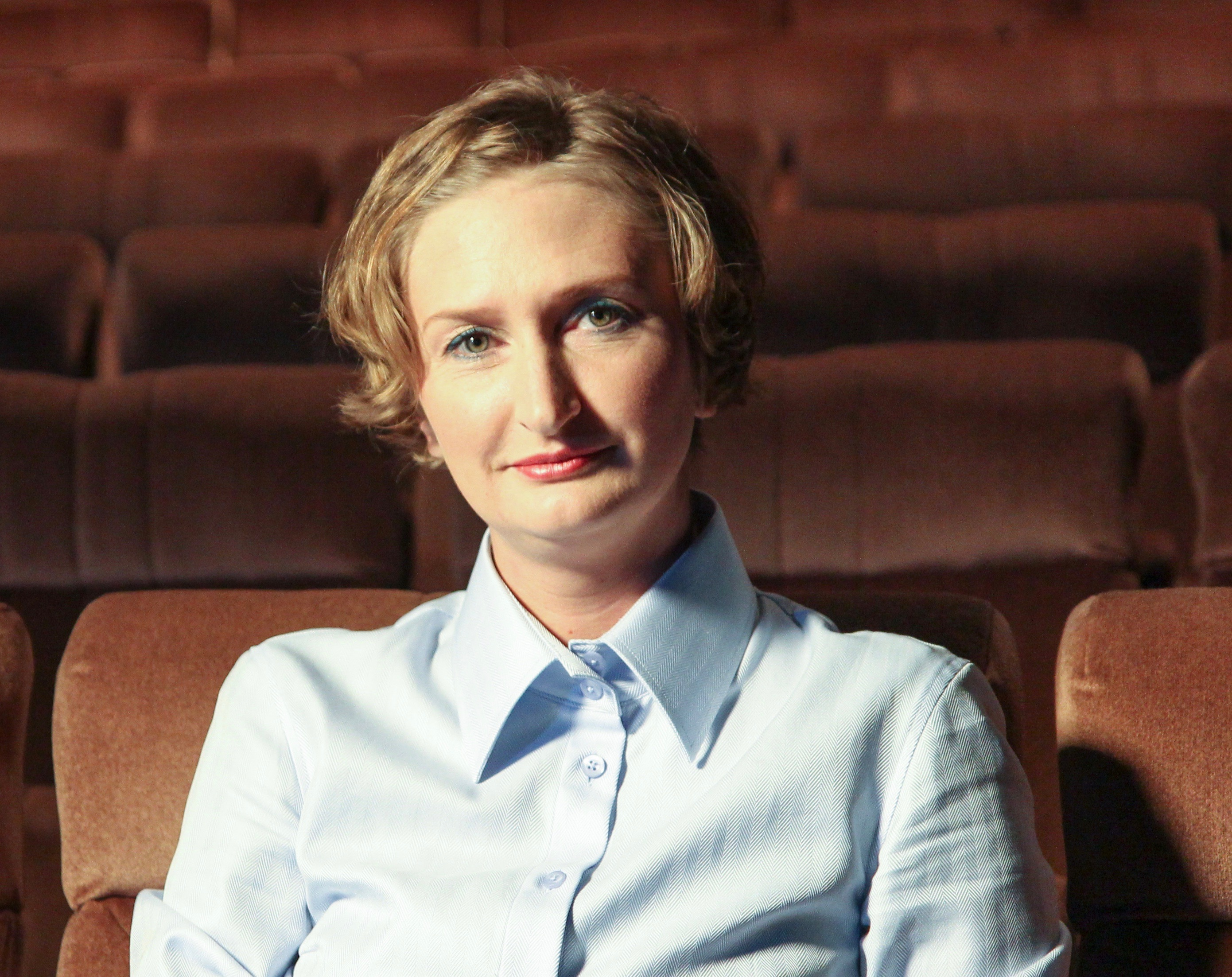 Kristiina Alliksaar Ugala Black Boxis, jaanuar 2016. Foto autor: Heigo Teder